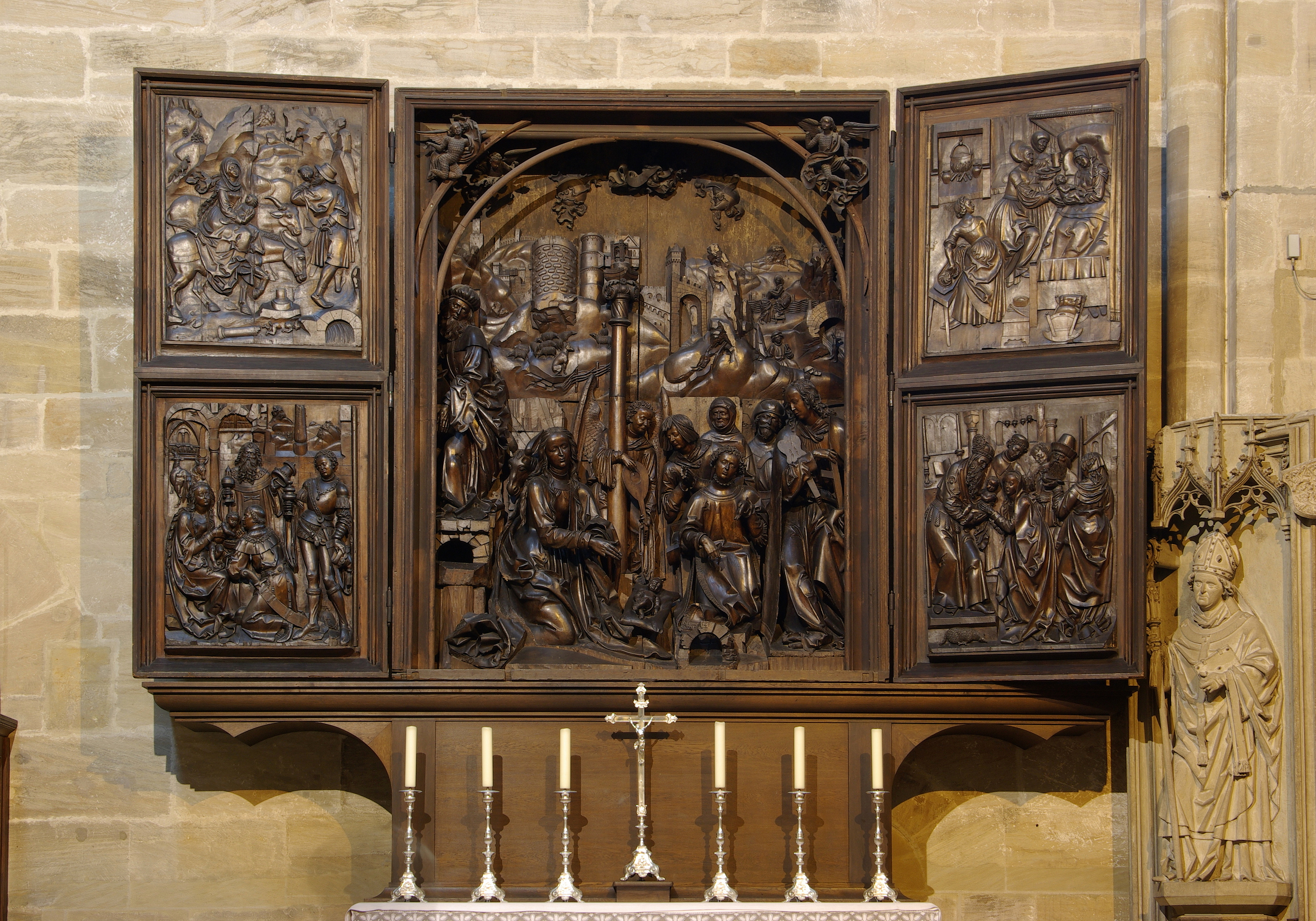 Bamberger Dom, Veit Stoß Altar